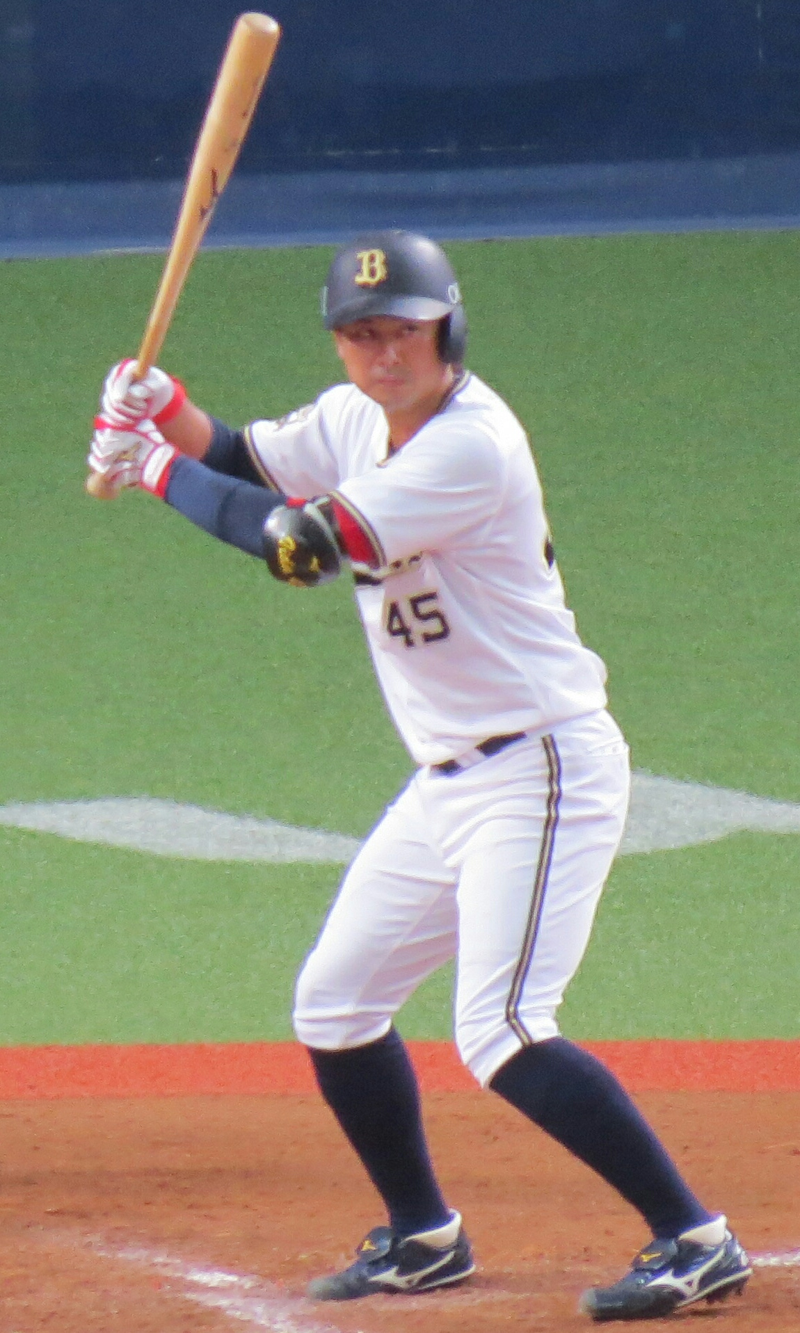 飯田大祐20190923